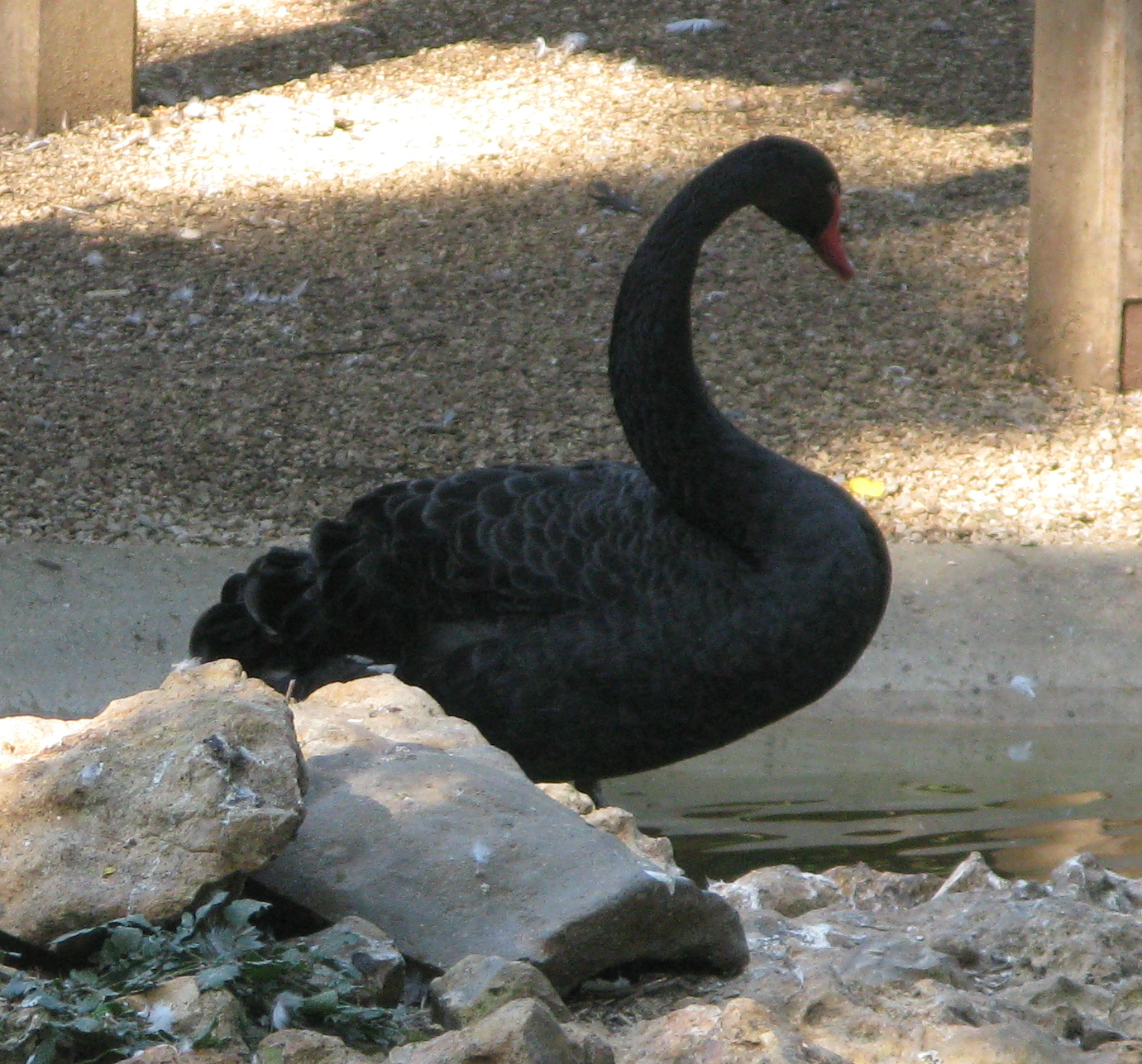 Cygne noir (cygnus atratus), parc de Blossac, Poitiers.